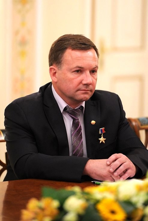 Лётчик-космонавт, Герой Российской Федерации Юрий Лончаков